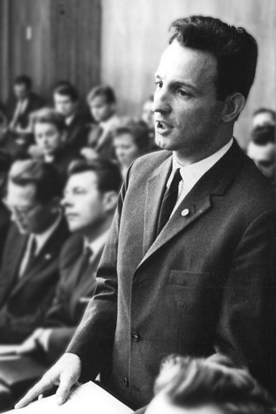 Zentralbild Junge 20.9.1968 Bgm-zie Berlin: 11. Sitzung des Staatsrates der DDR am 20.9.68. Der Staatsrat der DDR trat am 20.9.68 unter Vorsitz von Walter Ulbricht zu seiner 11. Sitzung zusammen. Im Mittelpunkt der Beratung im Amtssitz des Staatsrates am Marx-Engels-Platz steht ein Beschlußentwurf über "Die Aufgaben der Körperkultur und des Sports bei der Gesatlung des entwickelten gesellschaftlichen Systems des Sozialismus in der DDR". Auf unserem Foto: Thomas Köhler, Olympiasieger im Rennschlittensport und Verbandstrainer des Deutschen Schlitten- und Bobsport-Verbandes der DDR (r.), spricht in der Diskussion zum Beschlußentwurf.